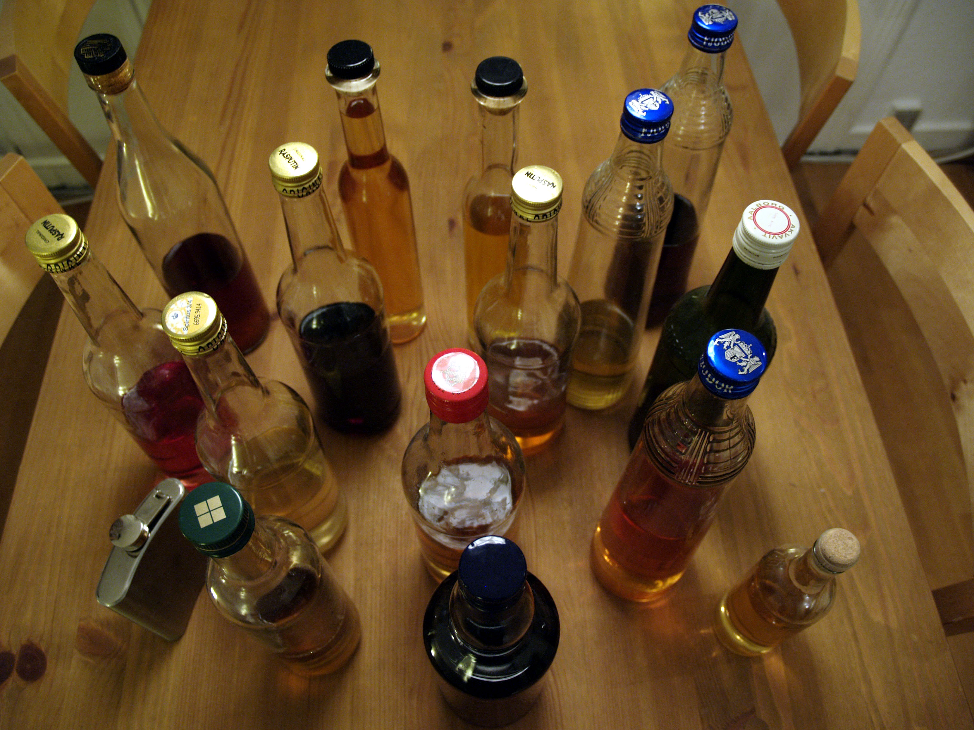 Snaps